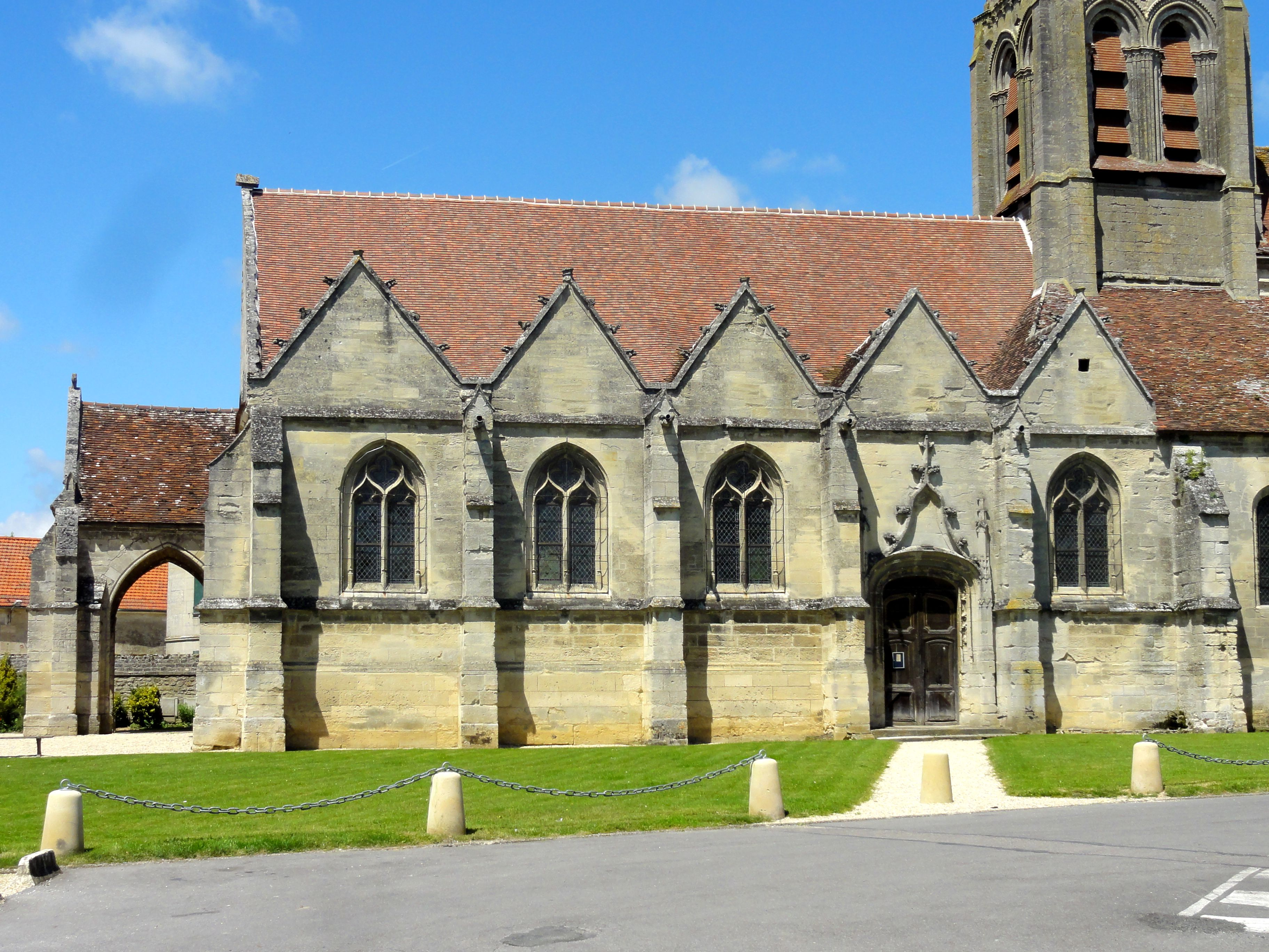 Collatéral sud.